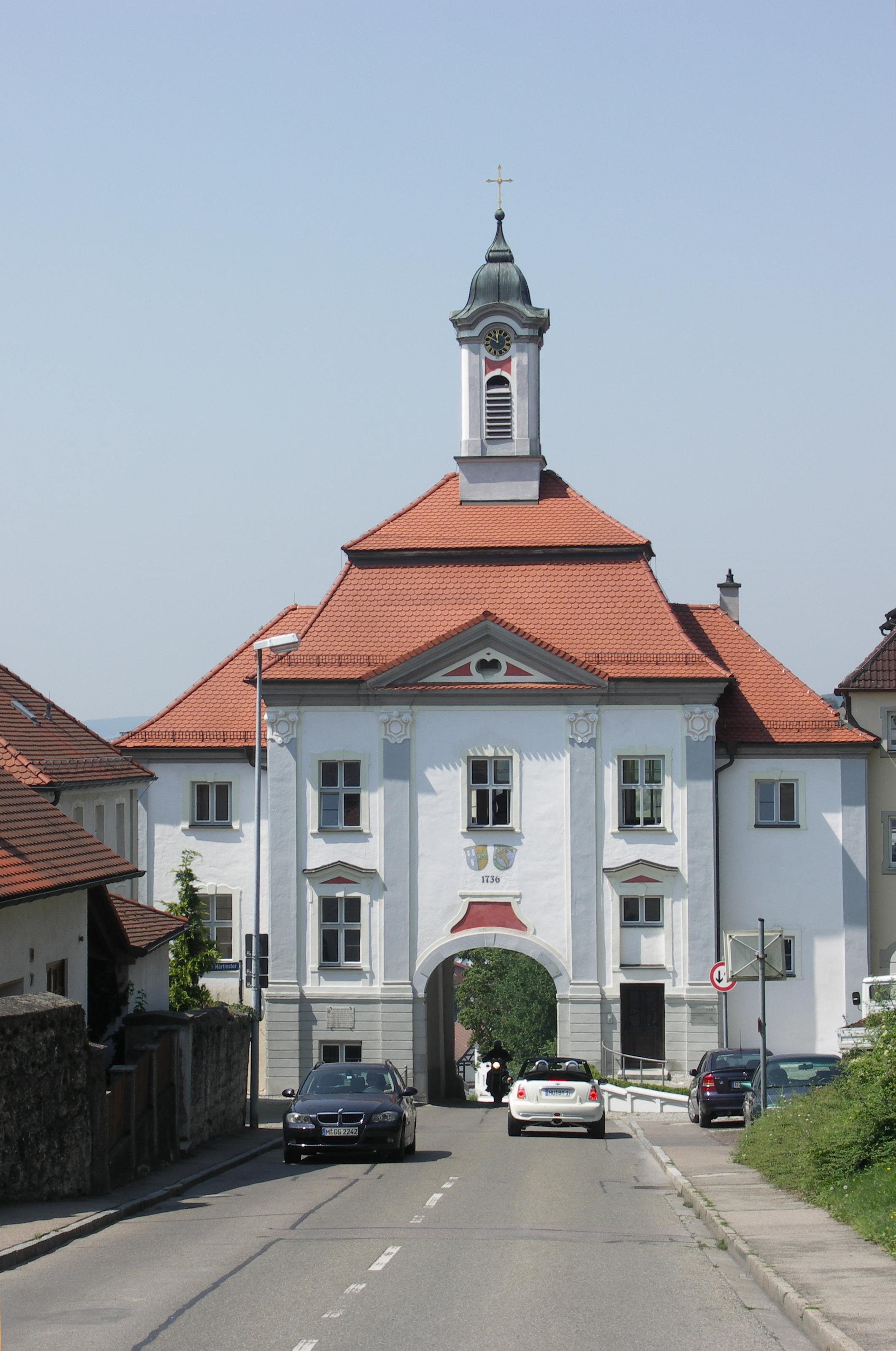 Das Bild zeigt das Torhaus von OstenThis is a photograph of an architectural monument.